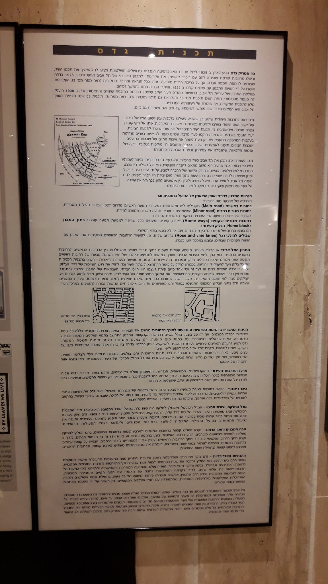 פטריק גדס